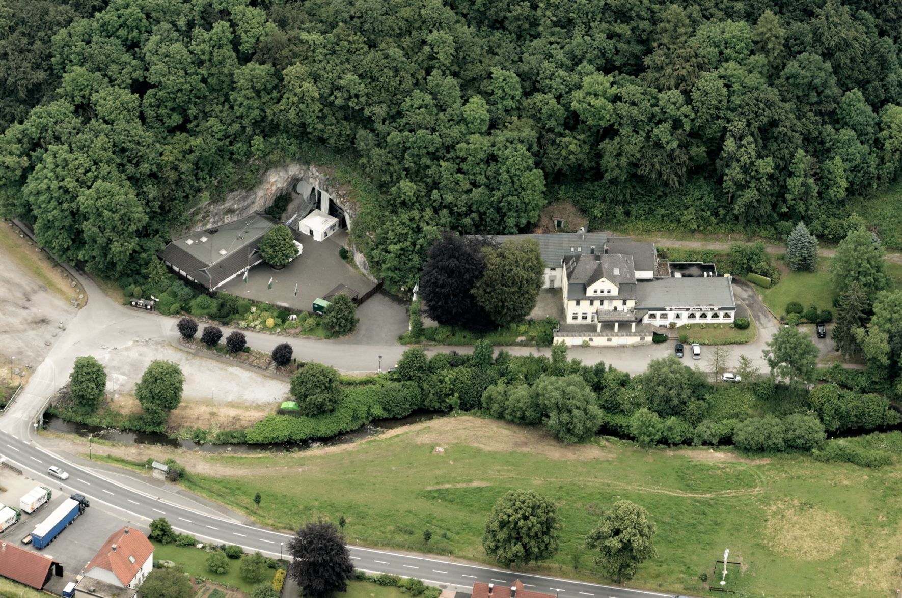 Fotoflug Sauerland Nord. Balve, Eingangsbereich der Balver Höhle, Bundesstraße 229 The making of this document was supported by the Community-Budget of Wikimedia Germany.